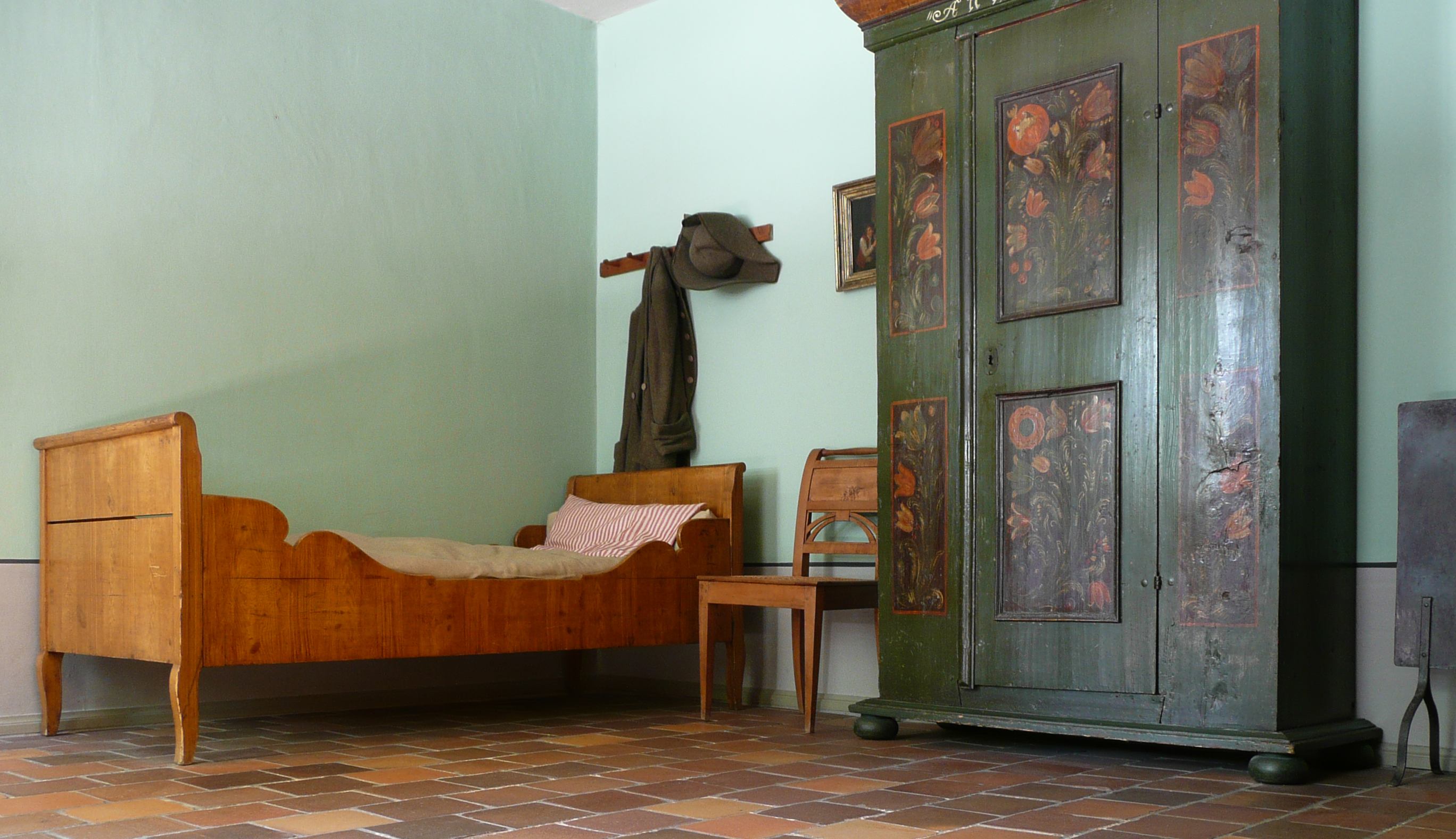 Blick in die Dienerstube in Schillers Weimarer Wohnhaus